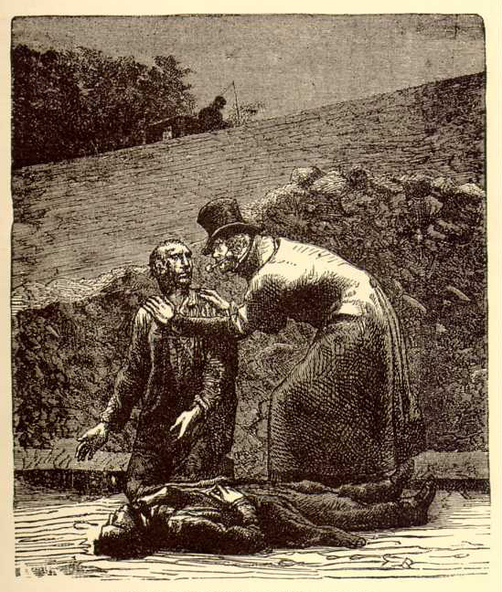 Javert reconhece Valjean quando este sai do esgoto com Marius.